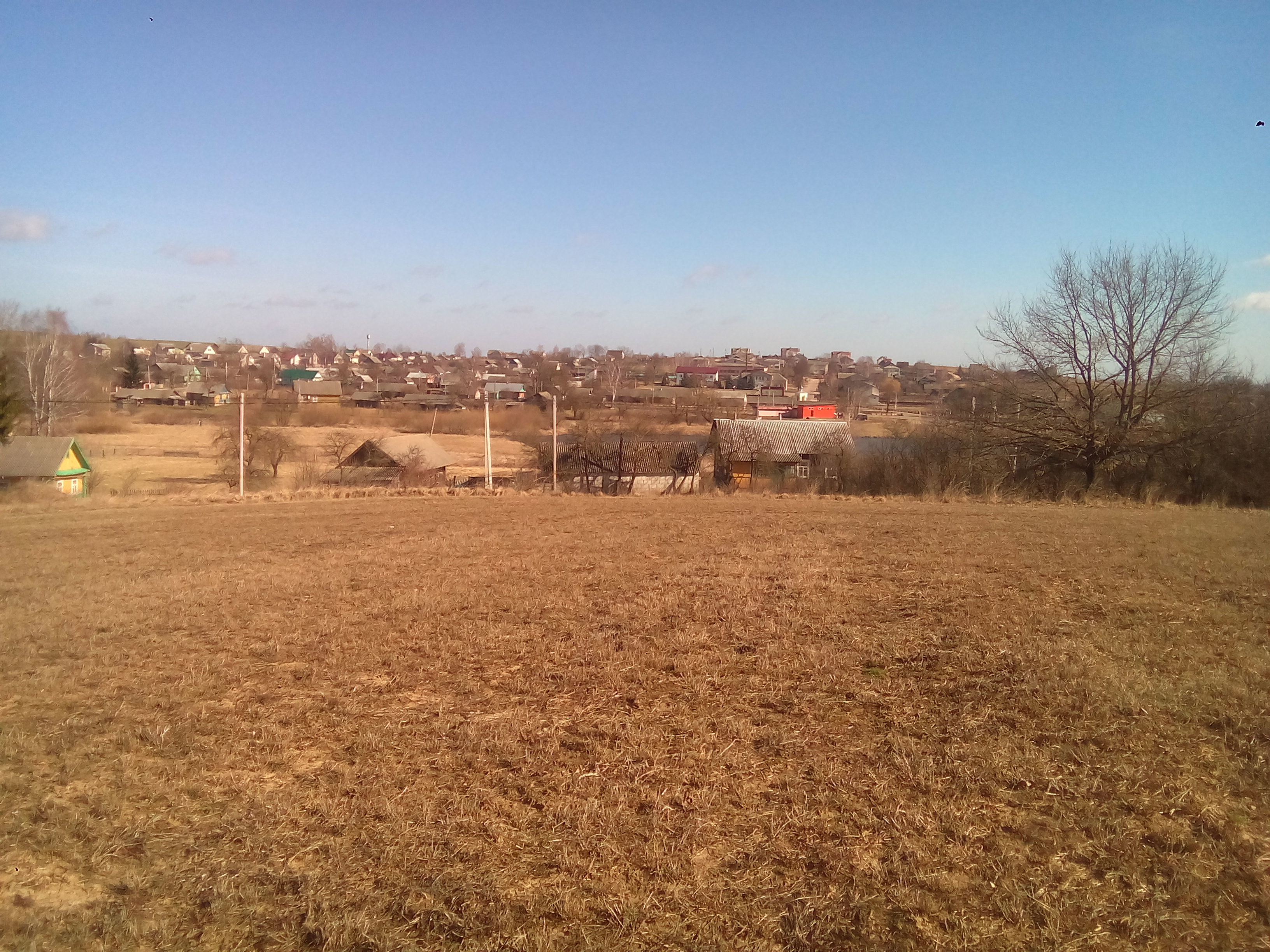 Краявід вёскі Лукі